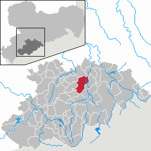 Drebach im Erzgebirgskreis, Sachsen